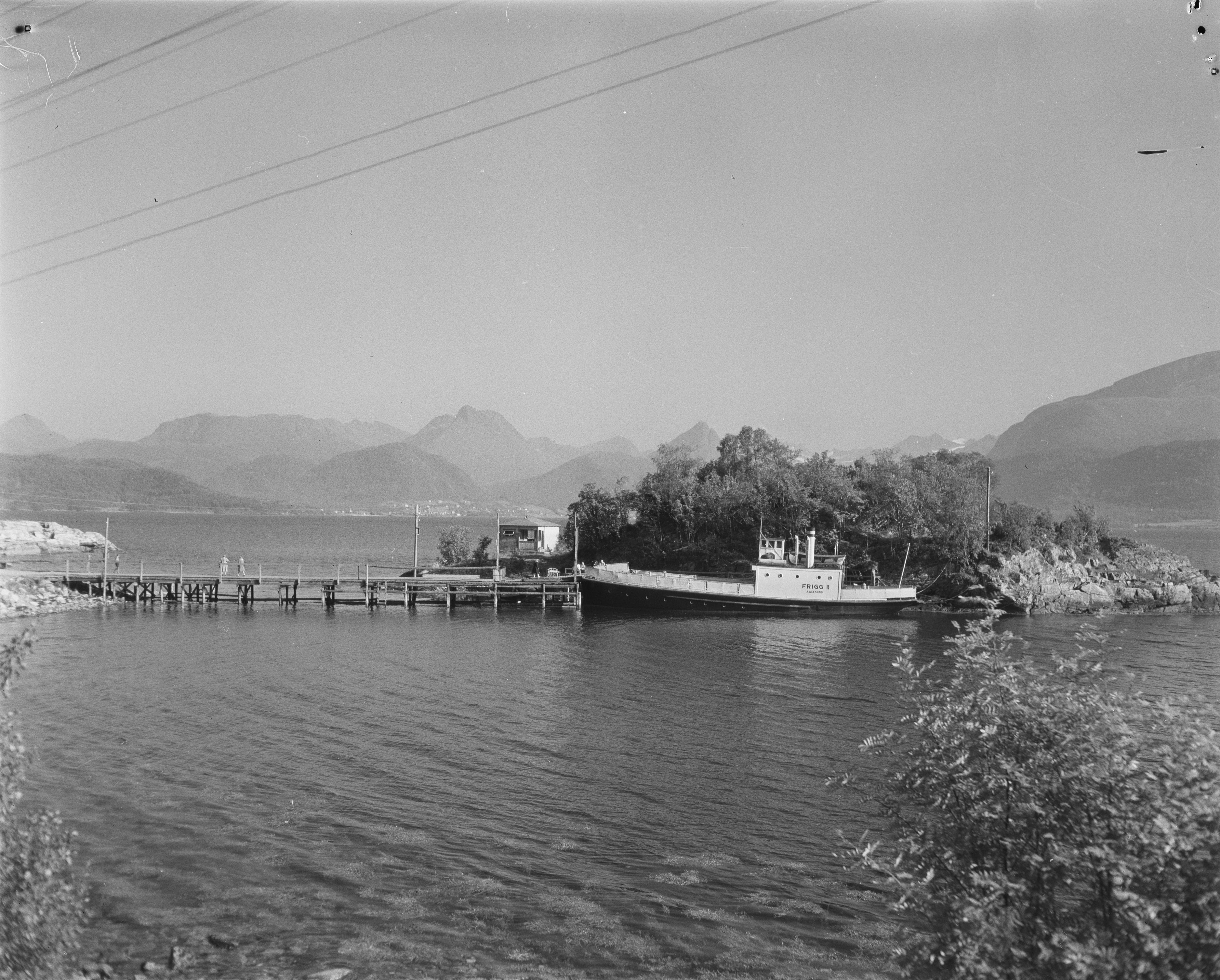 Bildet er hentet fra Nasjonalbibliotekets bildesamling. Anmerkninger til bildet var: Fotograf : ukjent Borgund,Magerholmen, Ålesund, Møre og Romsdal